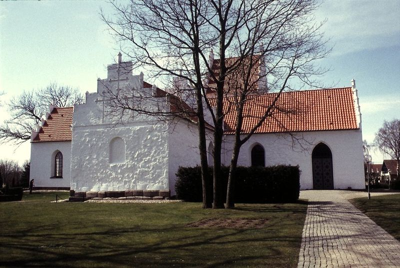 Hårby Kirke i Danmark. Kirken set fra øst